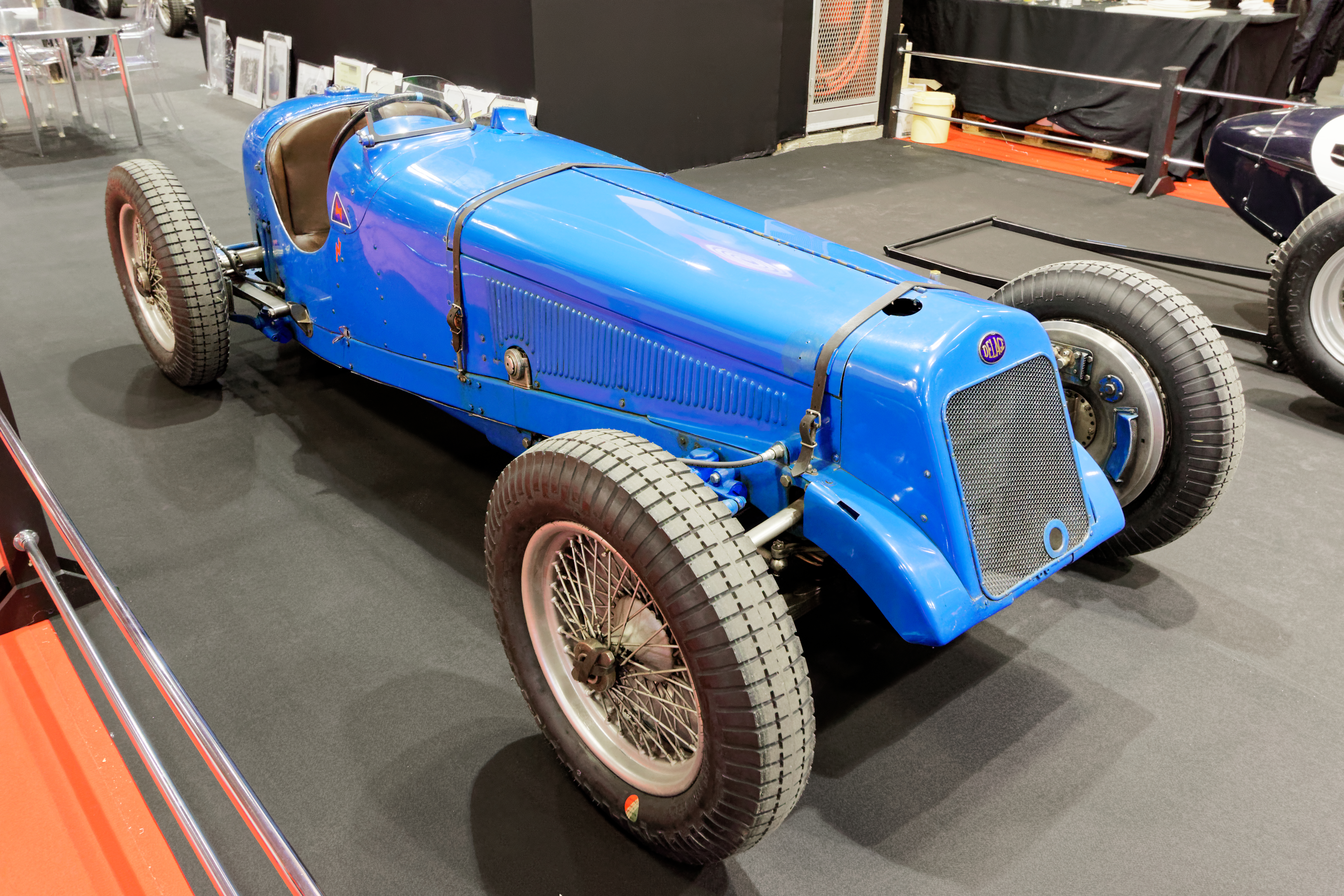 La Delage 15 S8 N°5 de 1927 exposée lors du salon Rétromobile 2017.